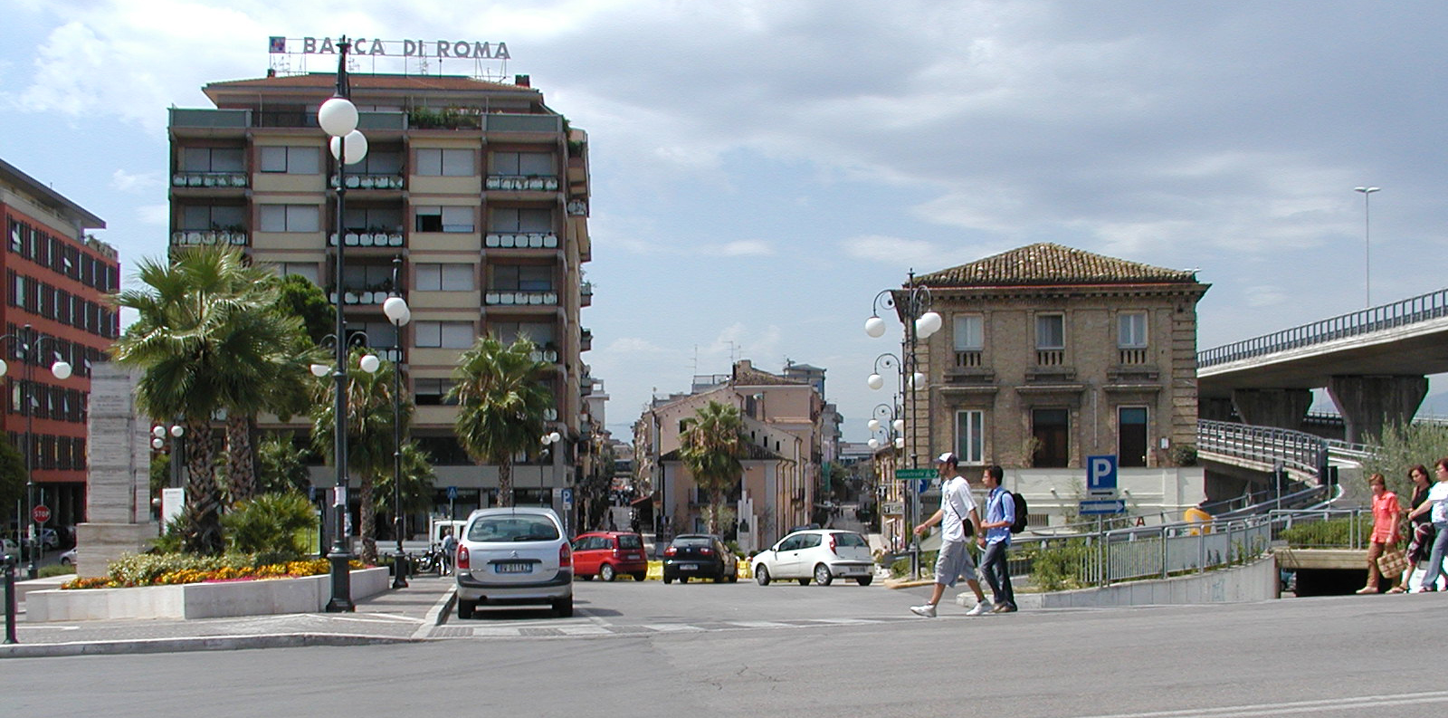 Die kleine Altstadt in Pescara